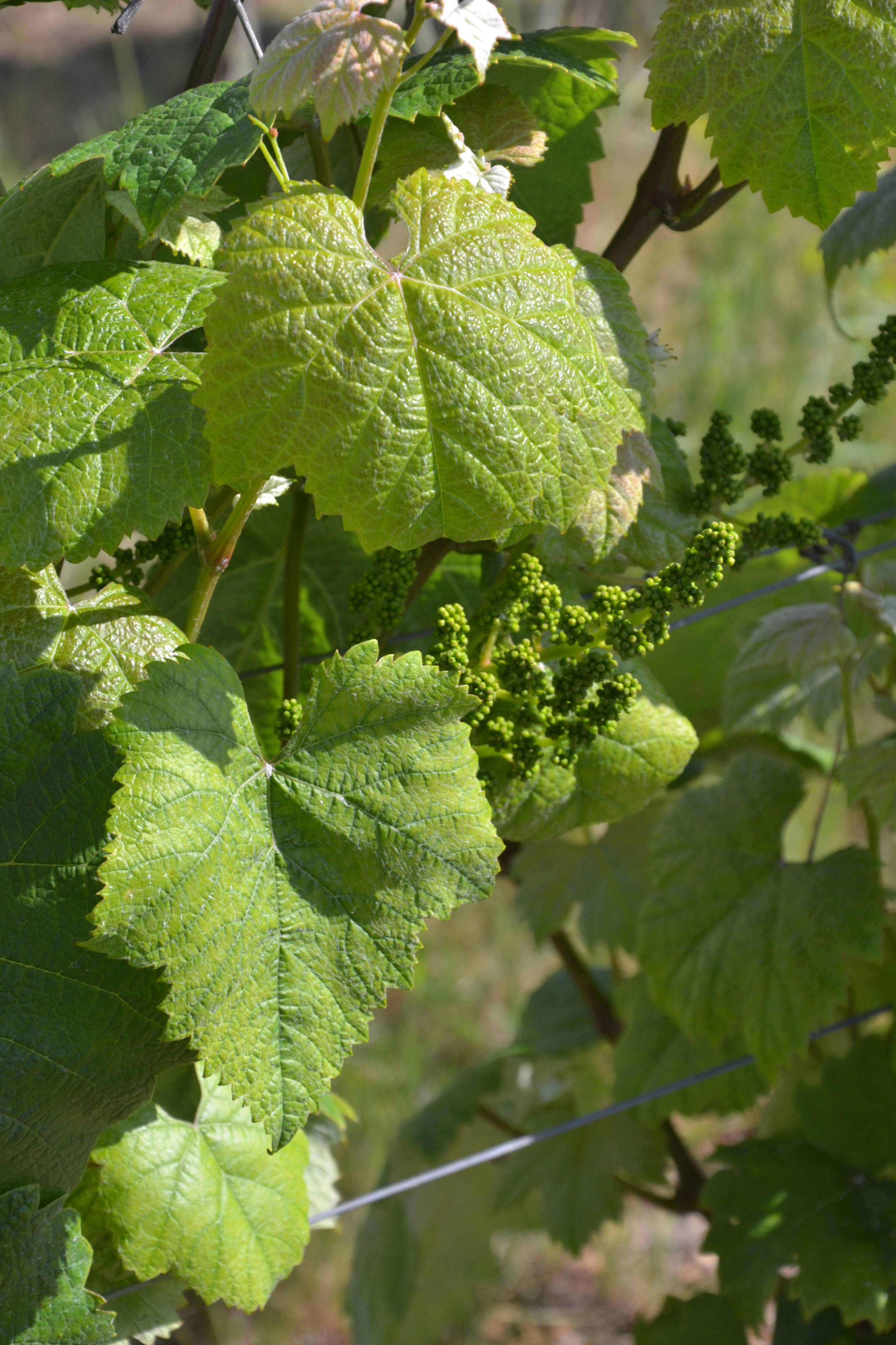 Formation d'une grappe dans une vigne de l'AOC Béarn